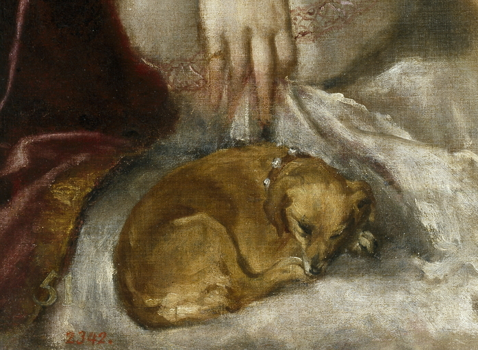 La obra representa a Dánae desnuda en su lecho y recibiendo a Zeus, que apareció en forma de lluvia de oro y la dejó embarazada.